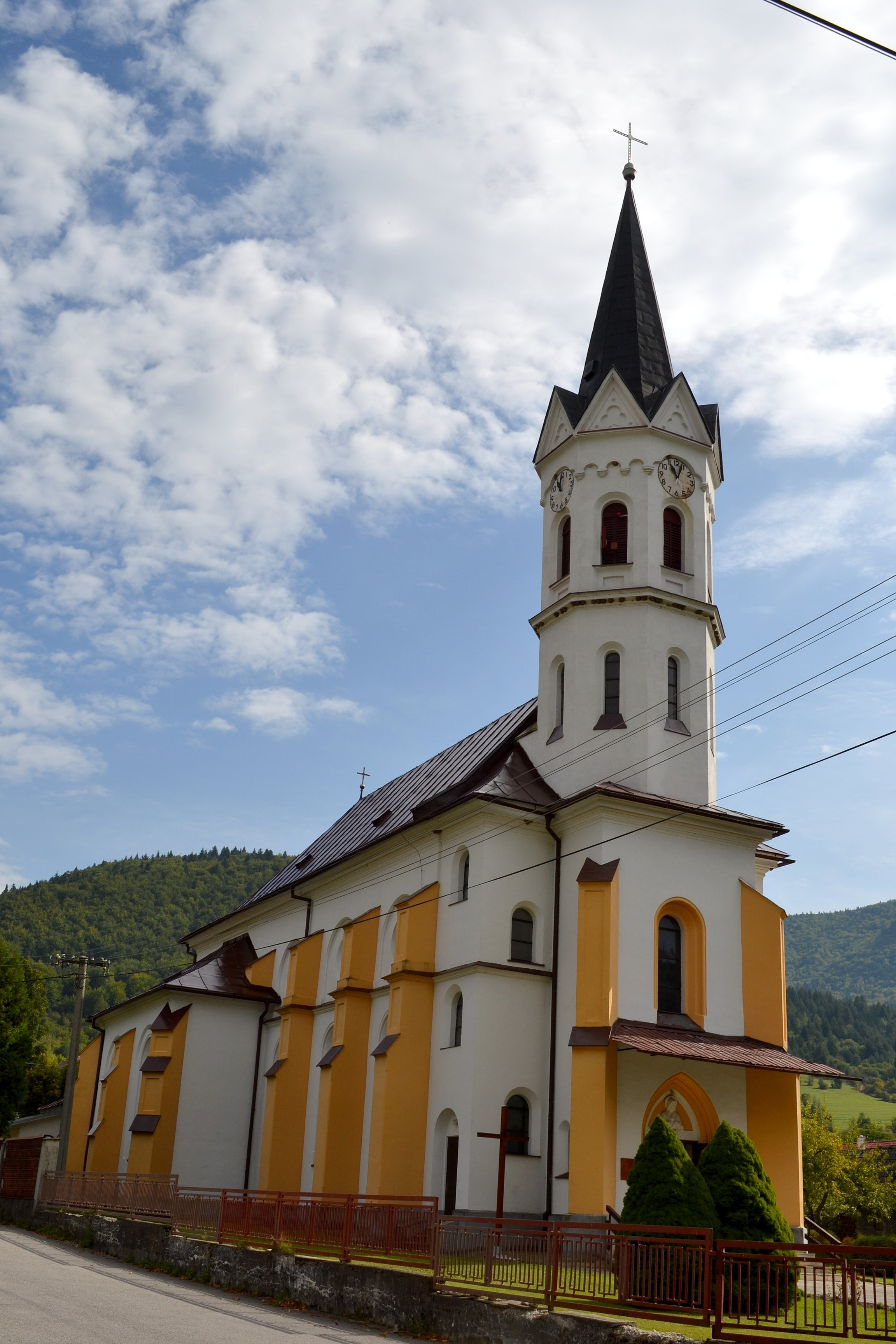 Stankovany (okr. Ružomberok), Kostol Božského Srdca Ježišovho; celkový pohľad